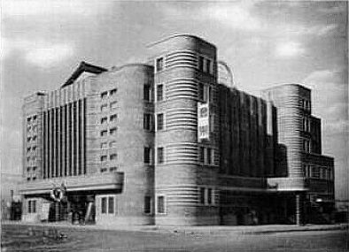 Feng-Ler Theatre（丰乐剧场）